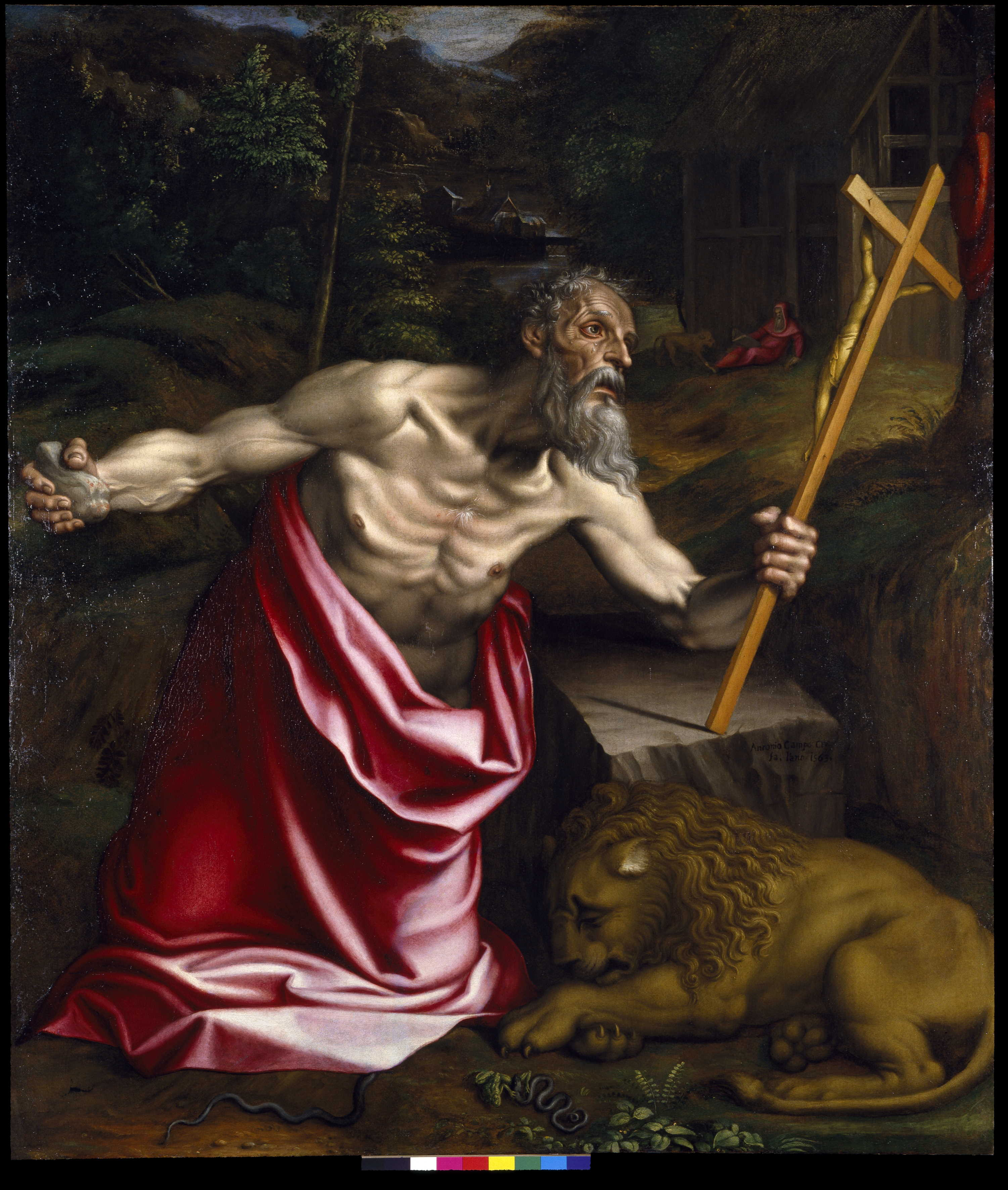 Saint Jerolamus